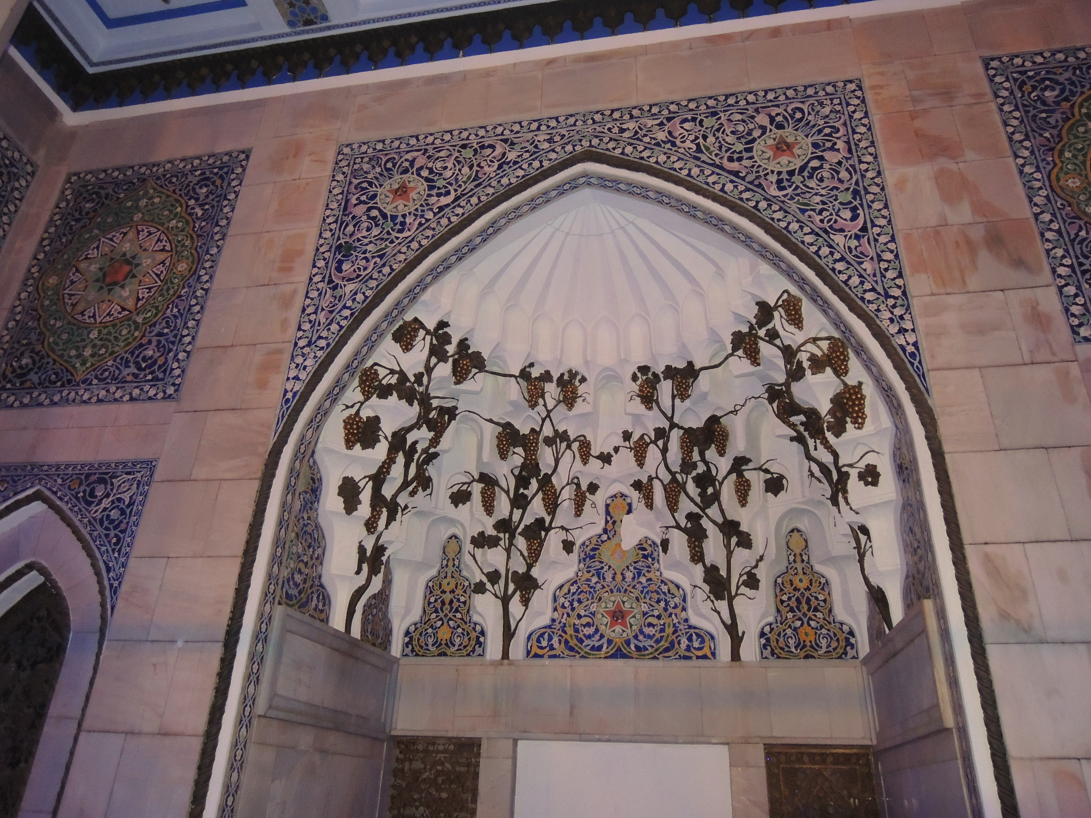 Павильон «Вычислительная техника» ("Азербайджан") во время реконструкции